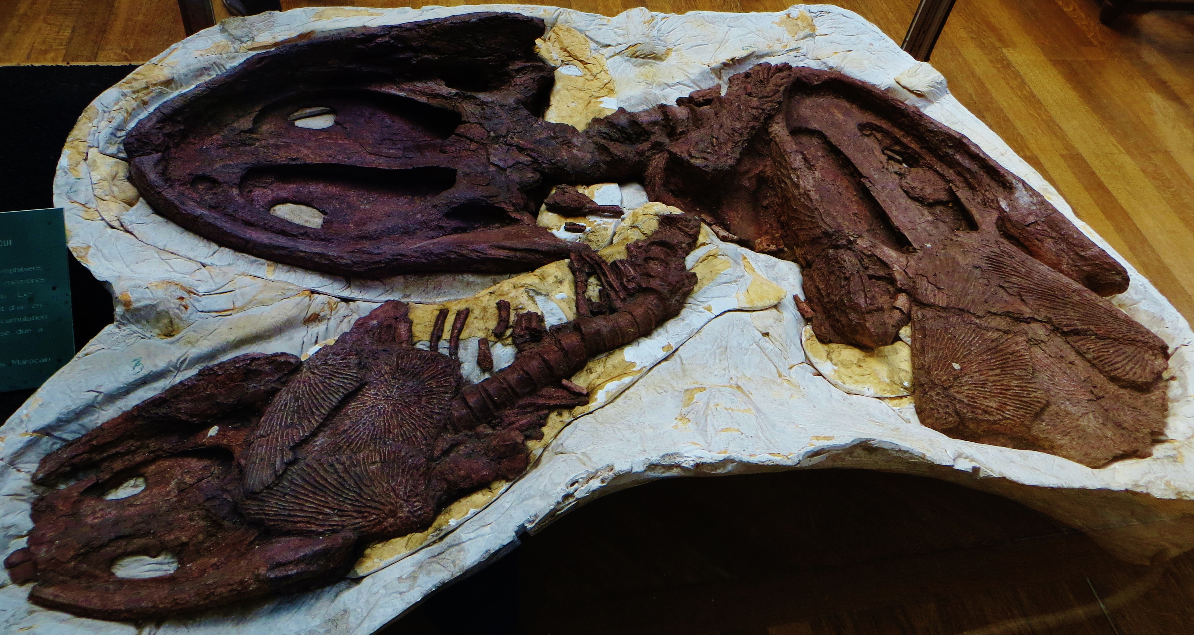 Fossil of Dutuitosaurus, an extinct amphibian- Took the photo at Musee d'Histoire Naturelle, Paris